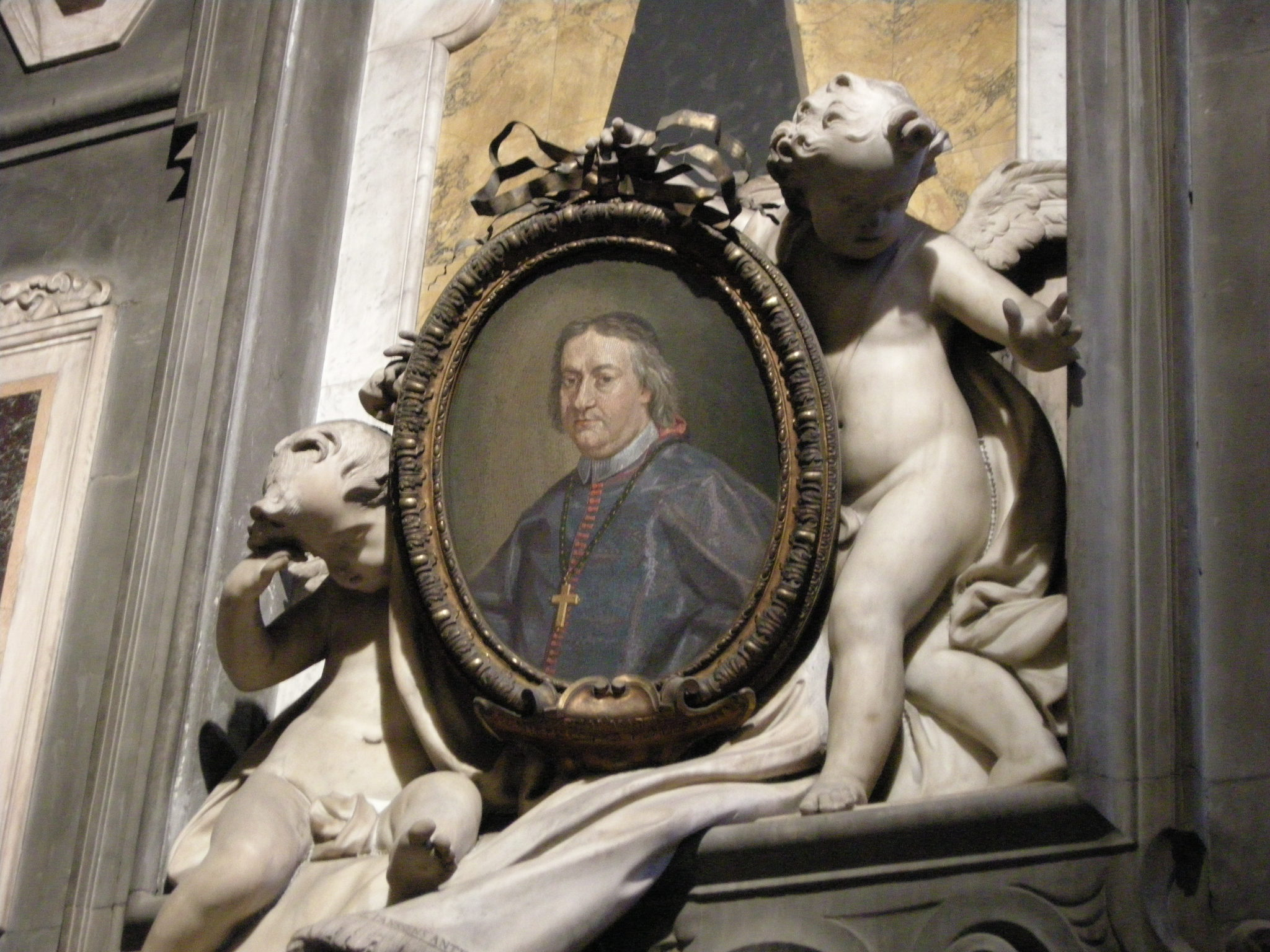 Cappella Martelli nella chiesa dei santi Michele e Gaetano a Firenze - Ritratto a mosaico dalla tomba dell'arcivescovo Giuseppe Maria Martelli.